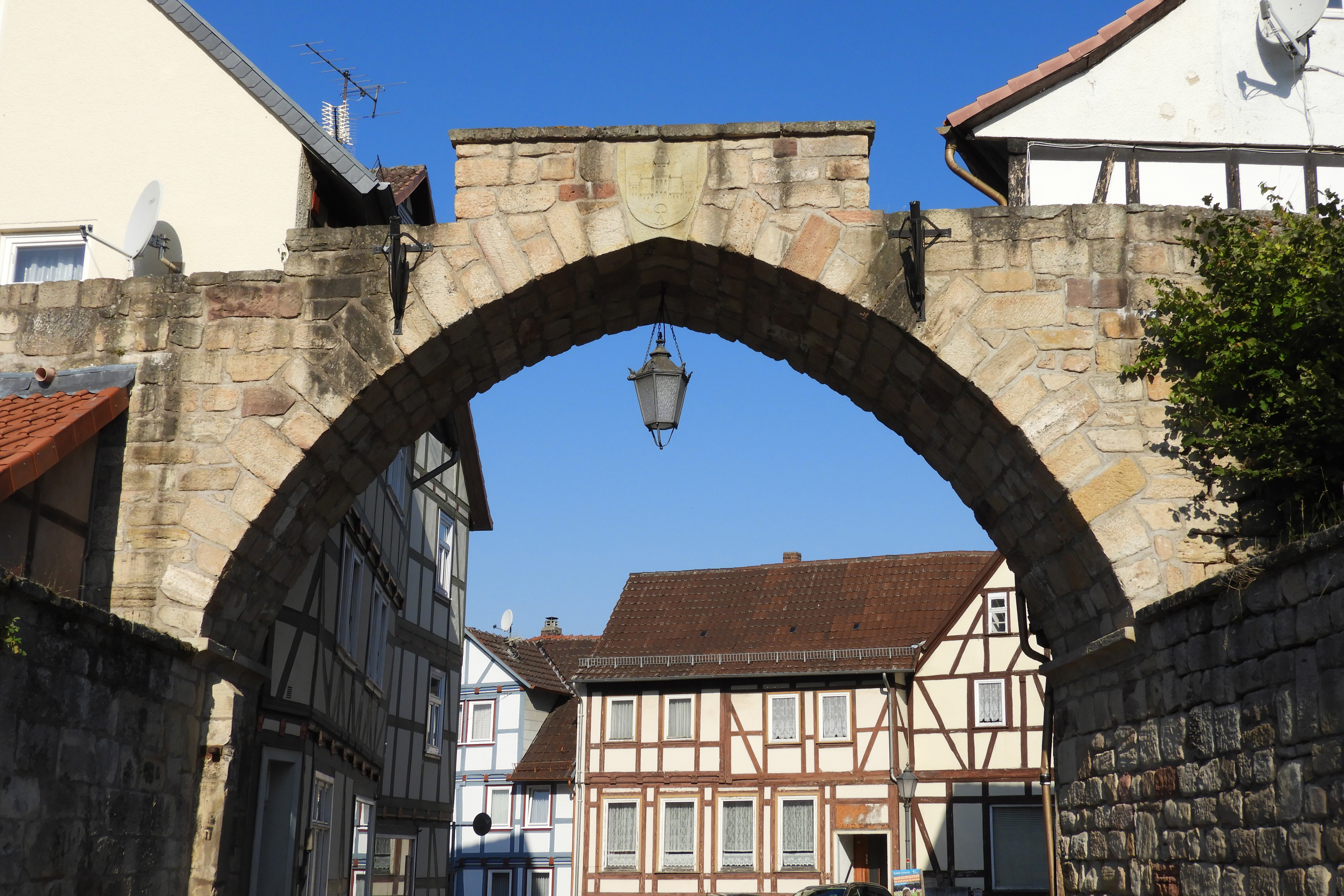 Das rekonstruierte Steintor In den 1990er Jahren wurde das seit mehr als 150 Jahren verschwundene Steintor nach alten Unterlagen wieder neu errichtet. Gründe für die Rekonstruktion sollen vor allem Teilnehmer japanischer Reisegruppen geliefert haben, die den Brunnen vor dem Tore mit dem Lindenbaum besucht haben, weil sie wussten, dass an dieser Stelle der Dichter Wilhelm Müller den Text des weltweit berühmten und beliebten Volkslieds „Am Brunnen vor dem Tore“ geschrieben hat und fragten, wo denn das dazugehörige Tor sei. Das ehemalige Steintor war das südöstliche Tor der Allendorfer Stadtbefestigung in Bad Sooden-Allendorf im nordhessischen Werra-Meißner-Kreis.